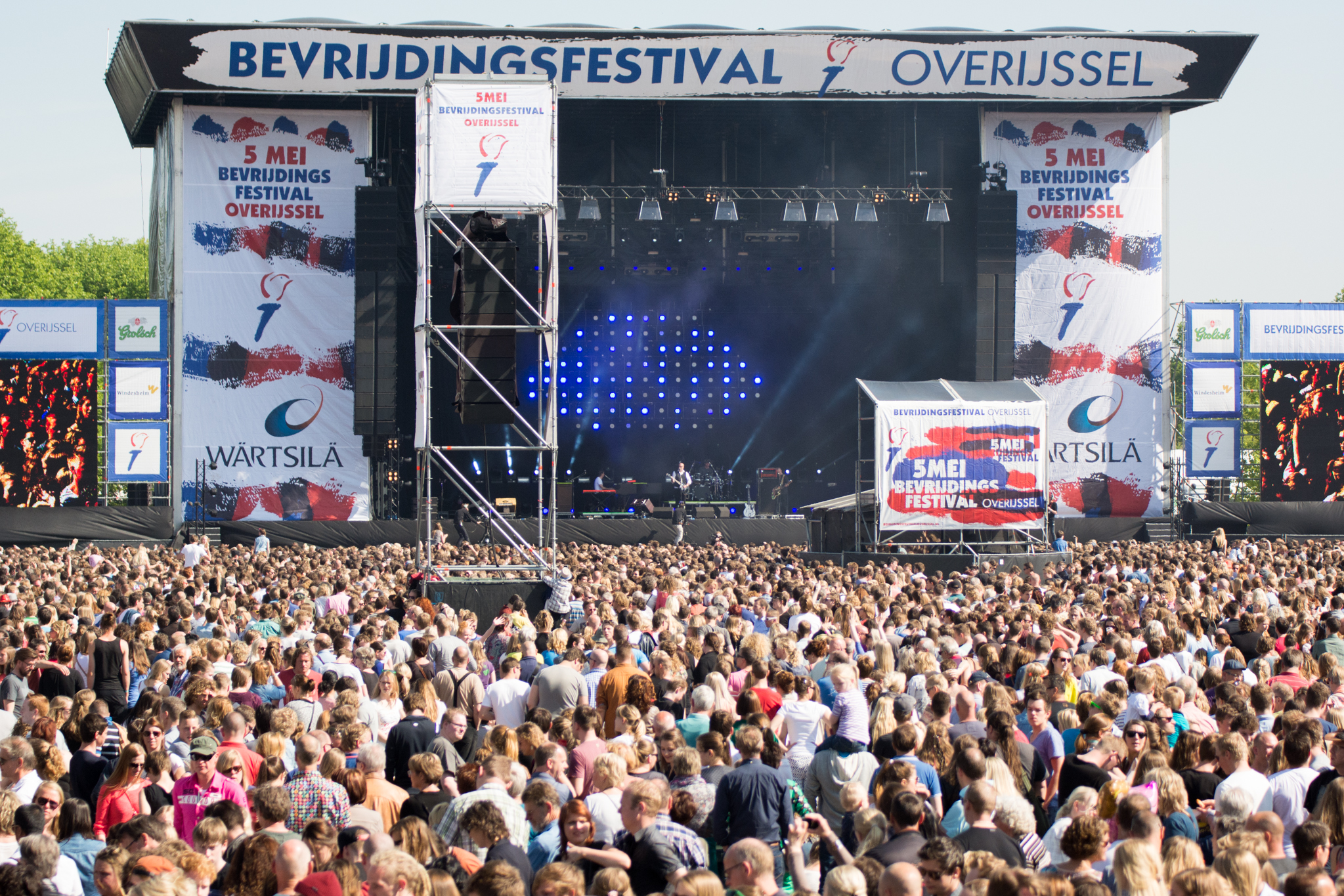 Het Bevrijdingsfestival Overijssel tijdens een optreden van de Zeeuwse band Blof.